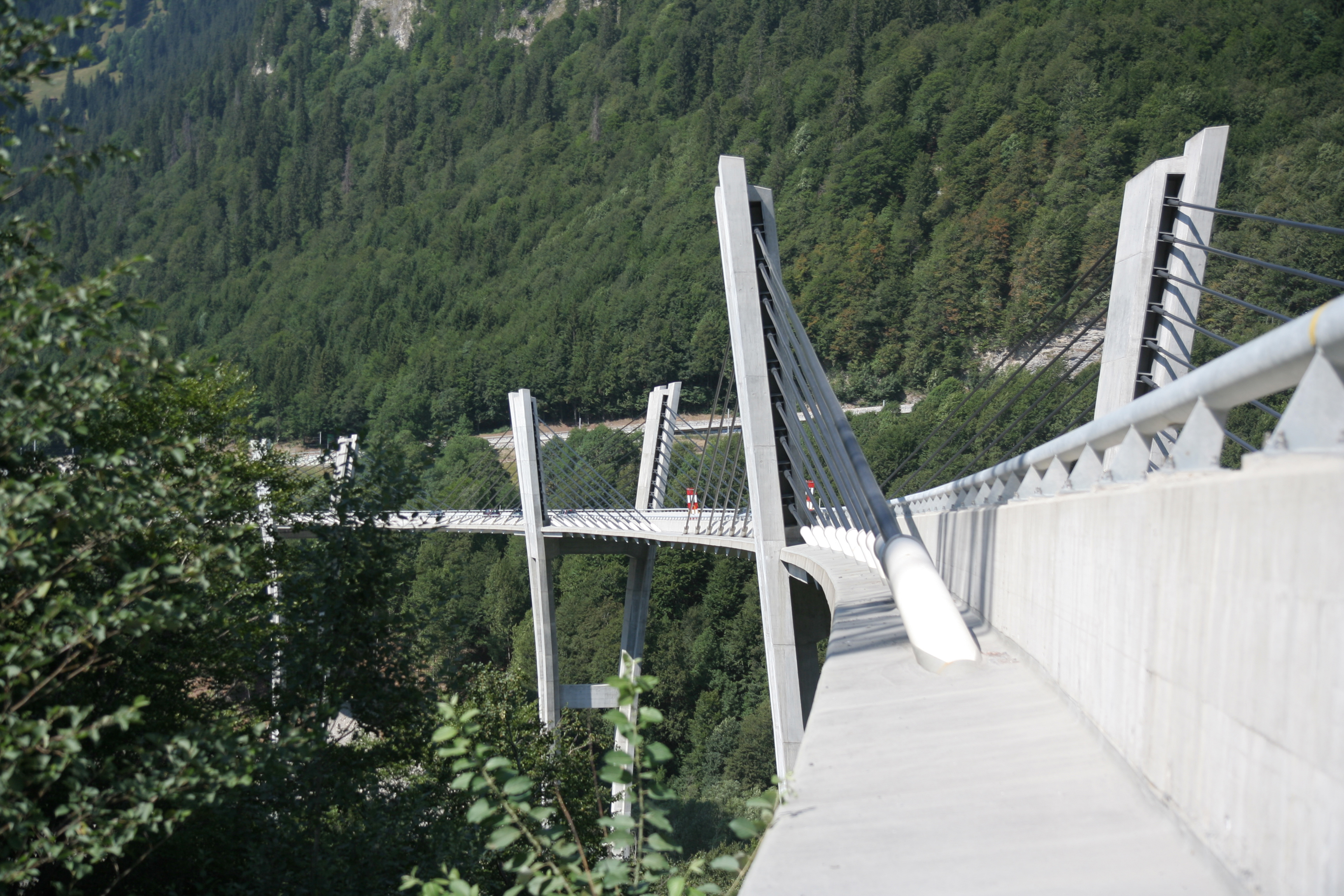 Die Sunnibergbrücke zwischen Serneus und Klosters Dorf, Schweiz; Ansicht vom südlichen Kopf aus